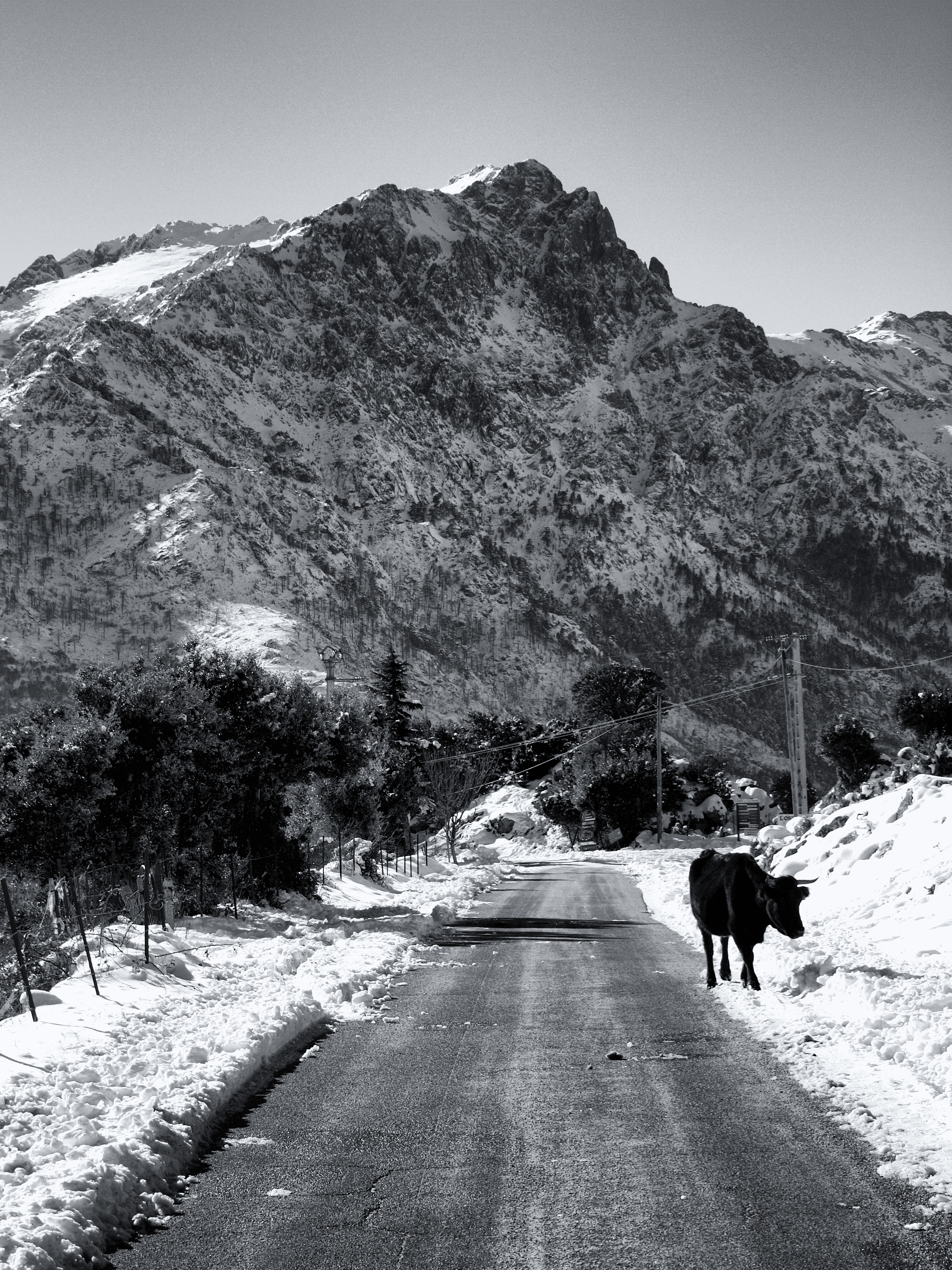 Olmi-Cappella, Balagne - (Corse) - La route D963 menant au Giussani. En arrière-plan, le monte Padro